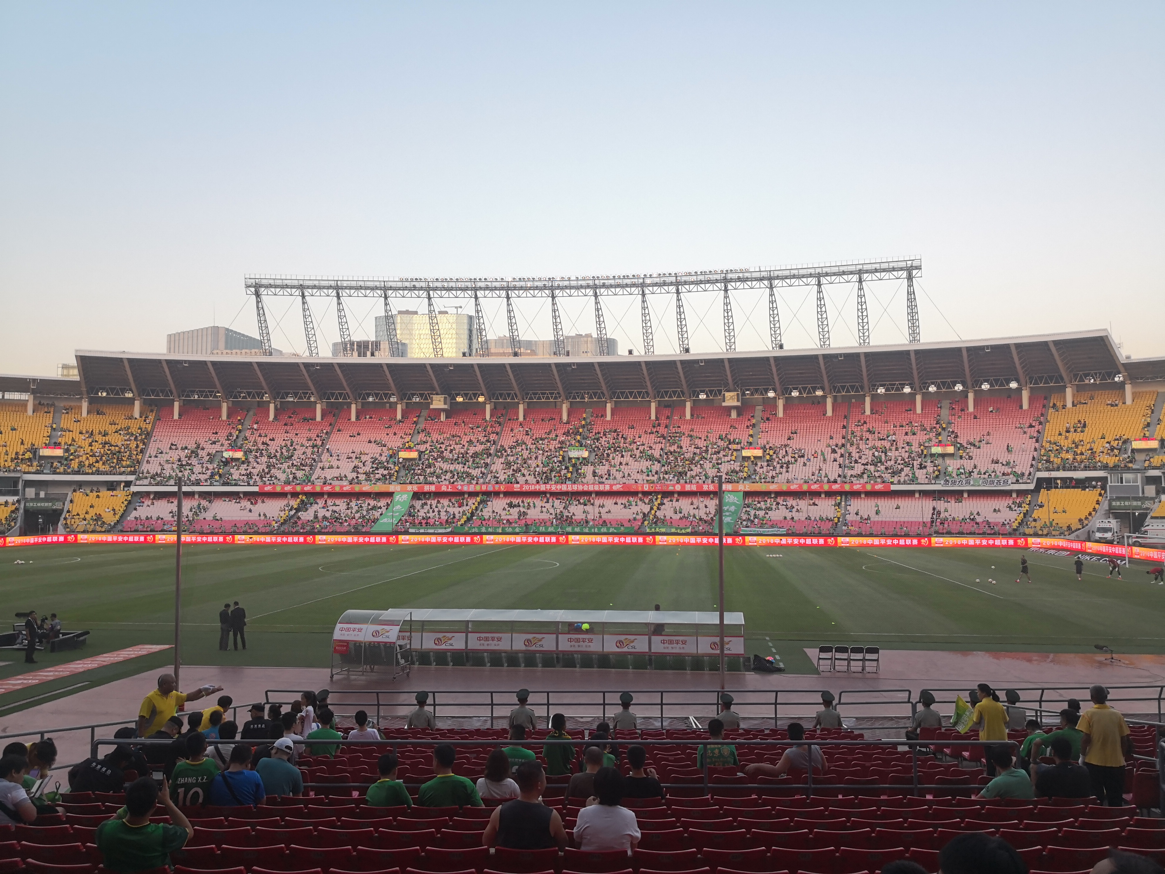 即将举行中超联赛（北京中赫国安-重庆斯威）的北京工人体育场